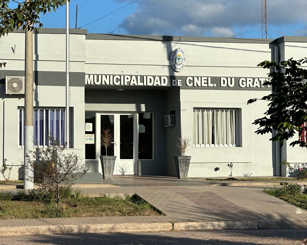 Municipalidad Coronel Du Graty 2016